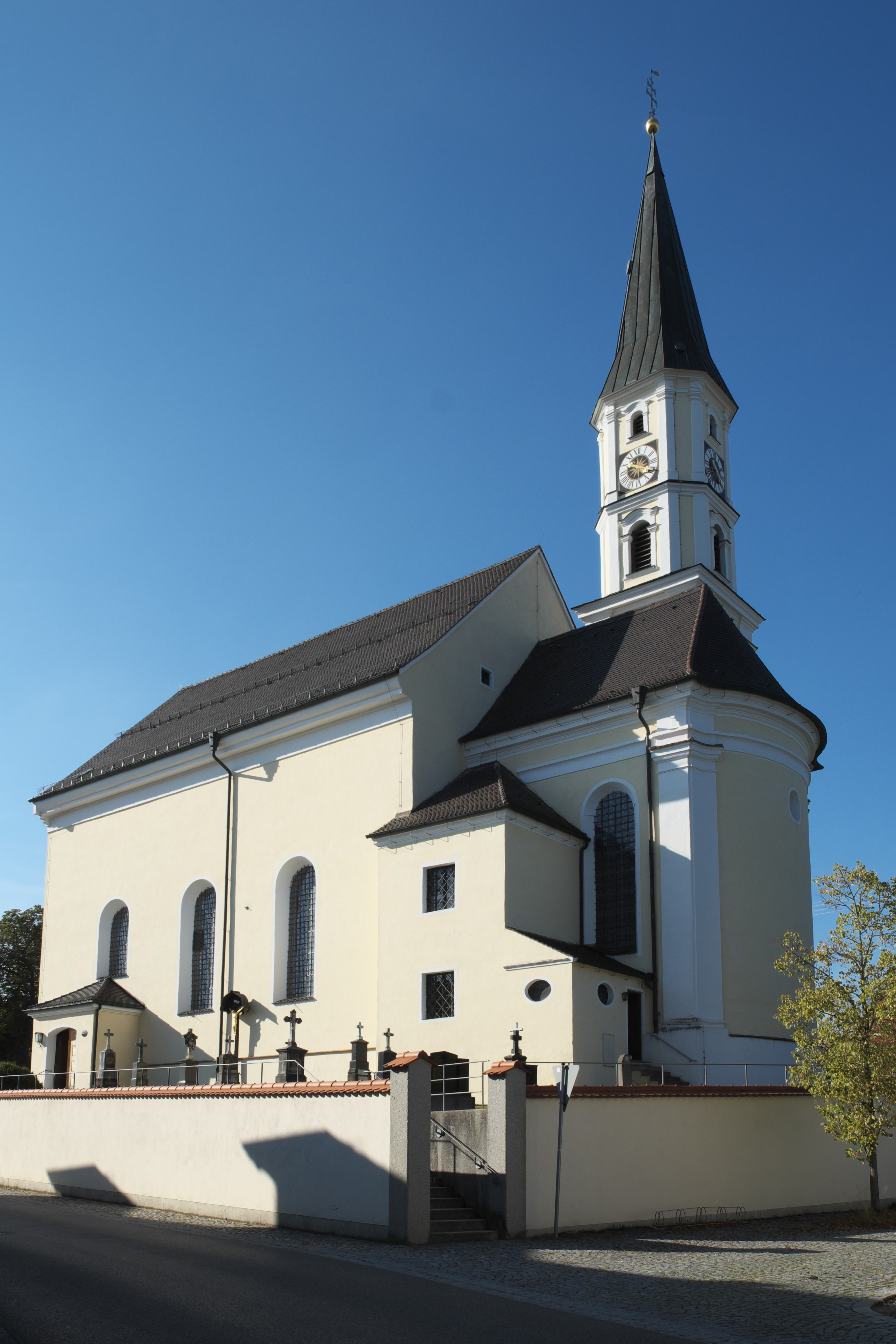 Katholische Pfarrkirche Sankt Peter und Paul in Oberigling (Igling) im Landkreis Landsberg am Lech (Bayern/Deutschland)